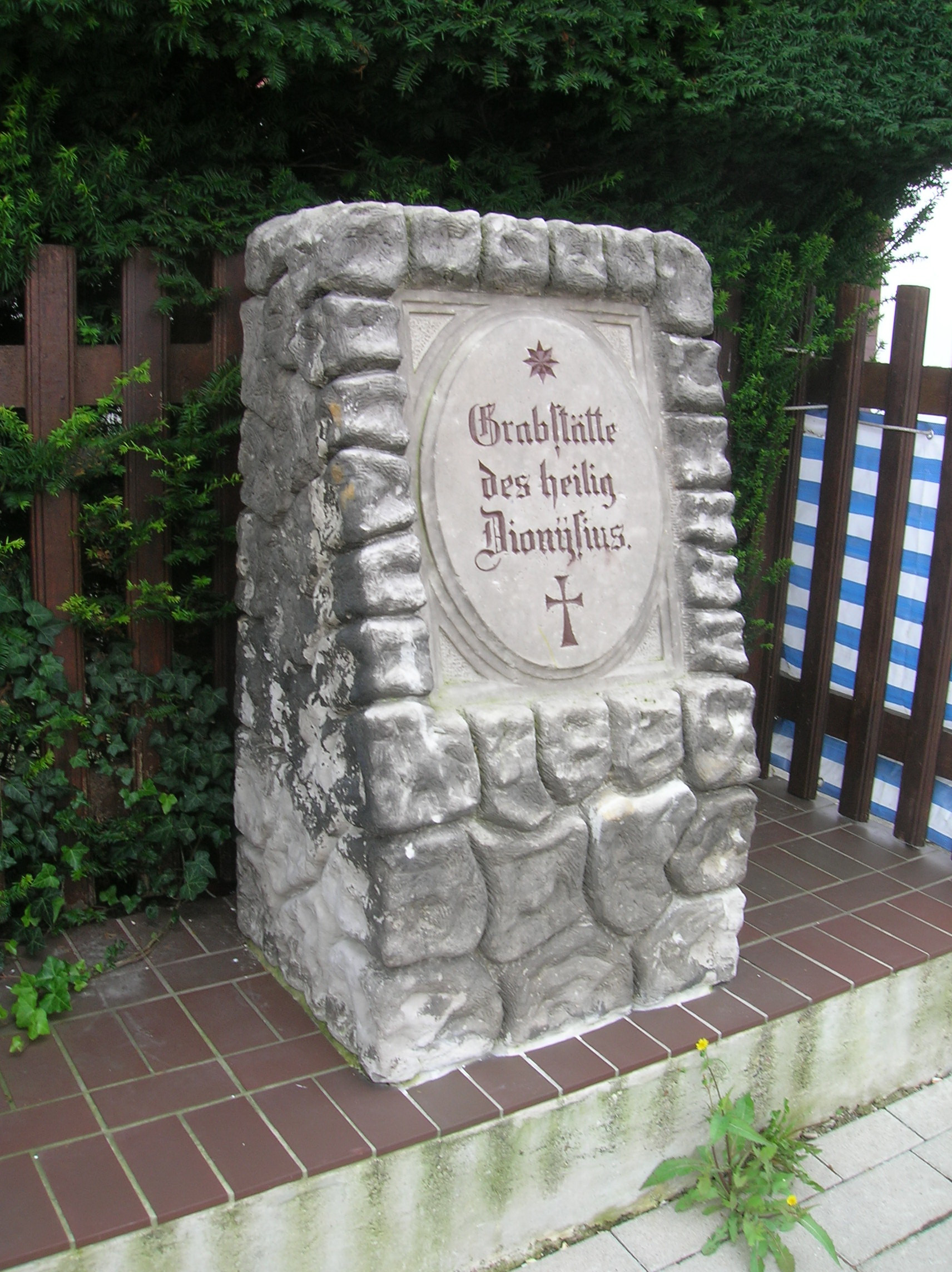 Grabstätte des hl. Dionysius in Bremerhaven-Lehe.